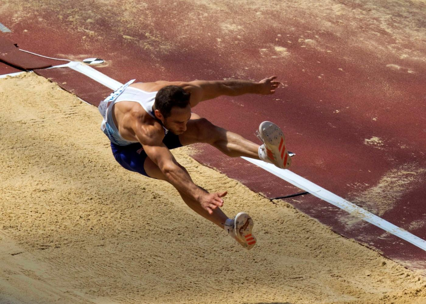 d7_9 tienkamp ver